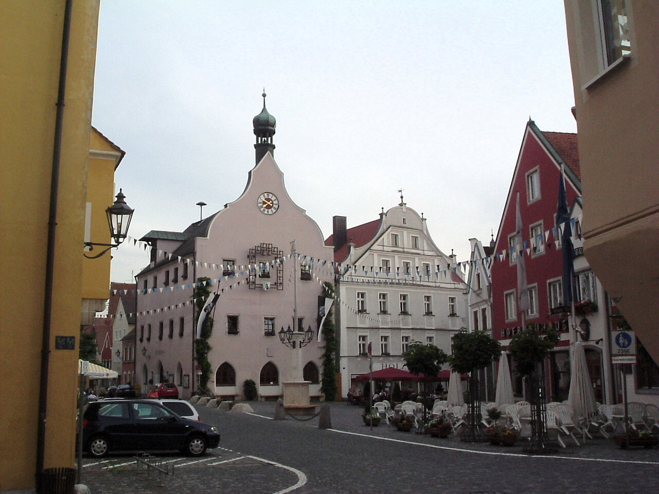 Abensberg - Stadtplatz mit Rathaus, Juni 2004